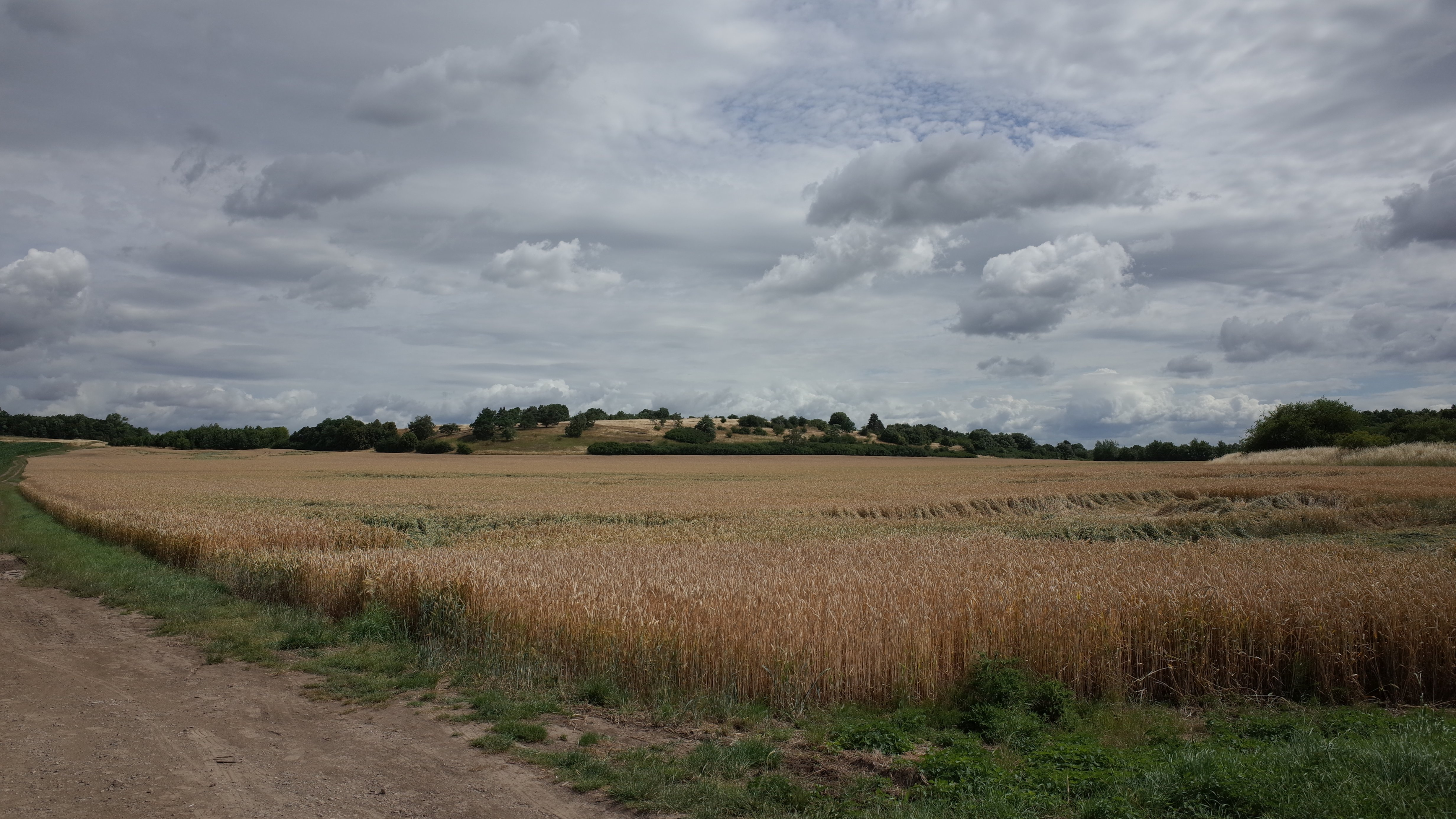 Landsberg (Saalekreis), Ortsteil Niemberg, Flächennaturdenkmal Burgstetten. FFH-Gebiet Nr.4438-302, Porphyrkuppen Burgstetten bei Niemberg. [1],[2],[3]